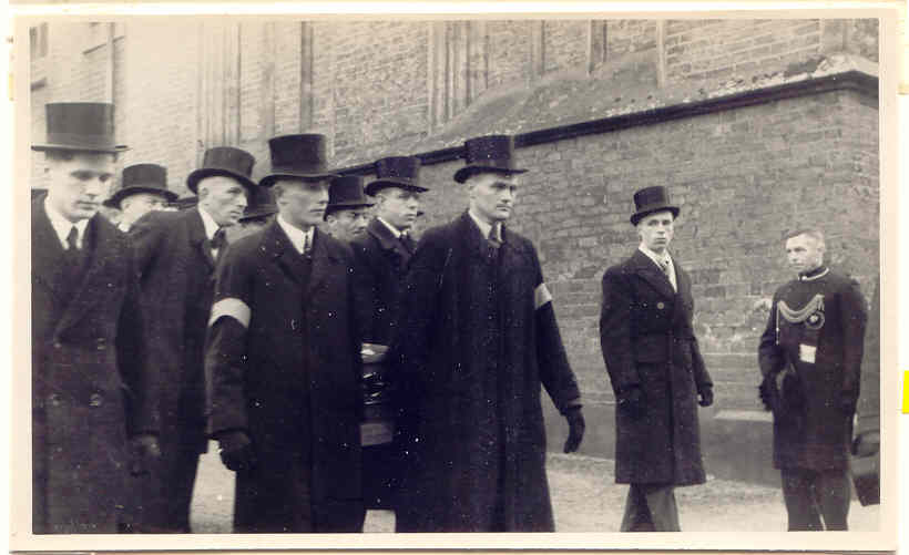 De bijzetting van lichamen van omgekomen verzetsstrijders uit te de Tweede Wereldoorlog in het Mausoleum in Ede. Enkele dragers:; 1: Menno de Nooij,; 2: H. Koudijs,; 3: Henk Borgers,; 4: Evert van Dijk en; 5: Paul de Nooij.